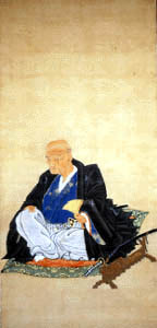 Nihonmatsu lord Niwa Nagatomi 二本松藩主丹羽長富